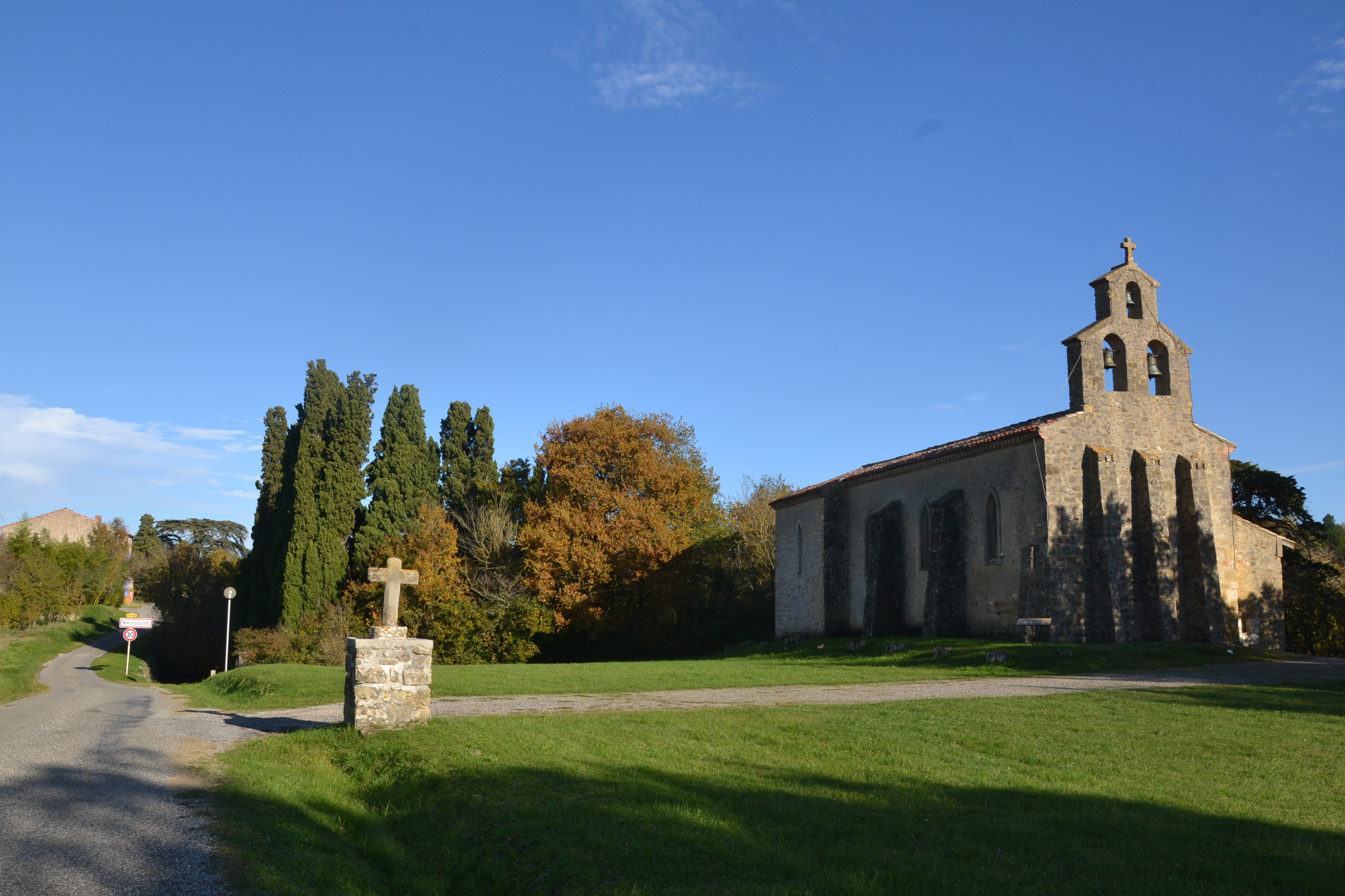 Croix et église Sainte-Marie à Malegoude (Ariège, France).